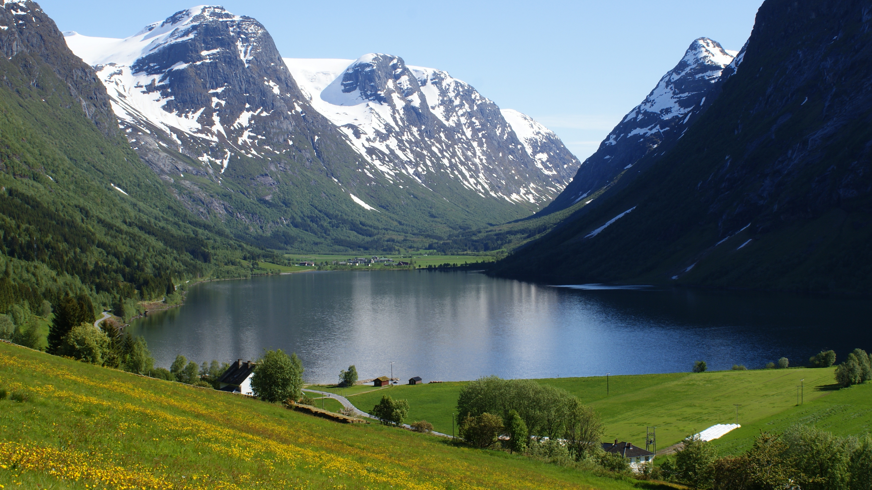 Myklebustdalen, Nordfjord, Sogn og Fjordane, Norway. Photographed from above Sanddal.